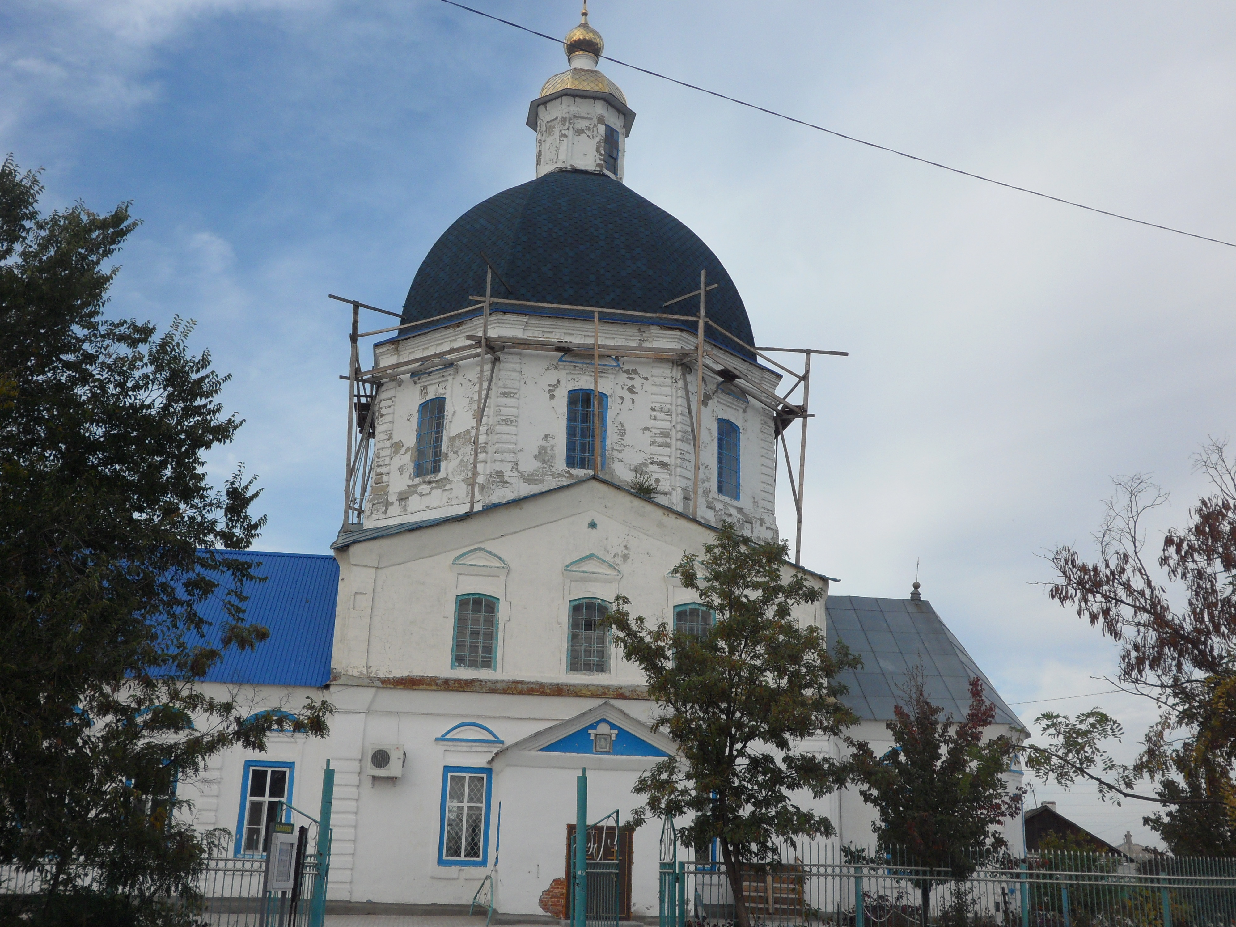 Осень